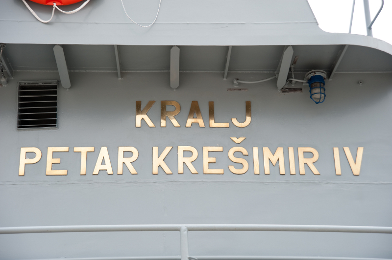 Dan HRM-a, Rijeka